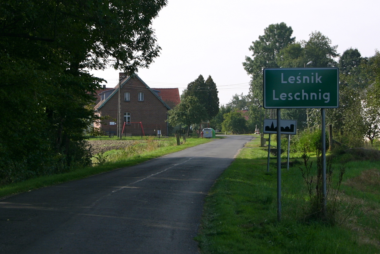 Leśnik (dodatkowa nazwa w j. niem. Leschnig) – wieś w Polsce położona w województwie opolskim, w w powiecie prudnickim, w gminie Głogówek.